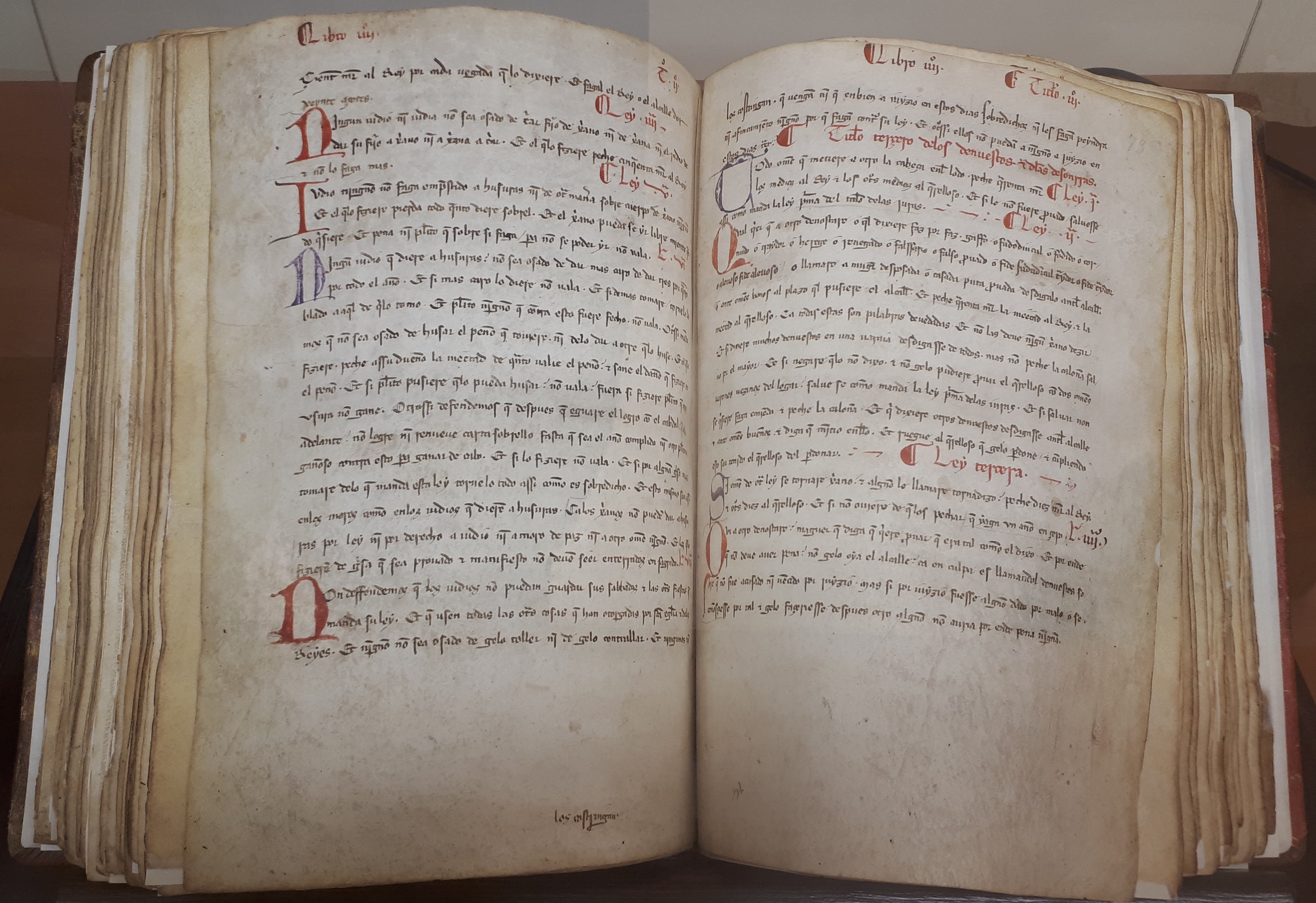 Páginas del Fuero de Briviesca, otorgado por la infanta Blanca de Portugal el 16 de diciembre de 1313. Manuscrito sobre pergamino en tinta negra y roja.